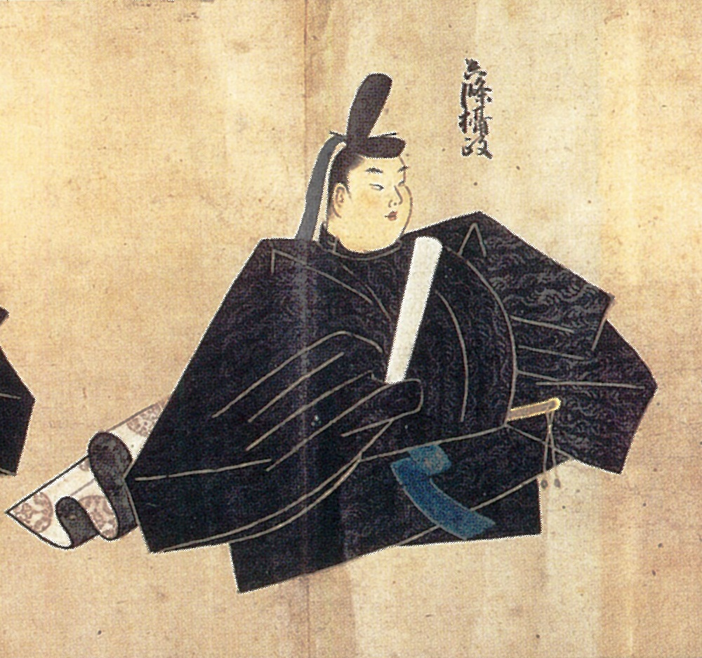 近衛基実の肖像画。